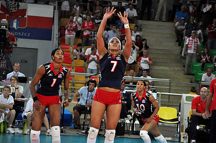 Niverka Marte